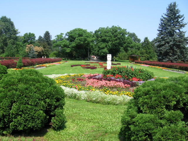 Центральная аллея